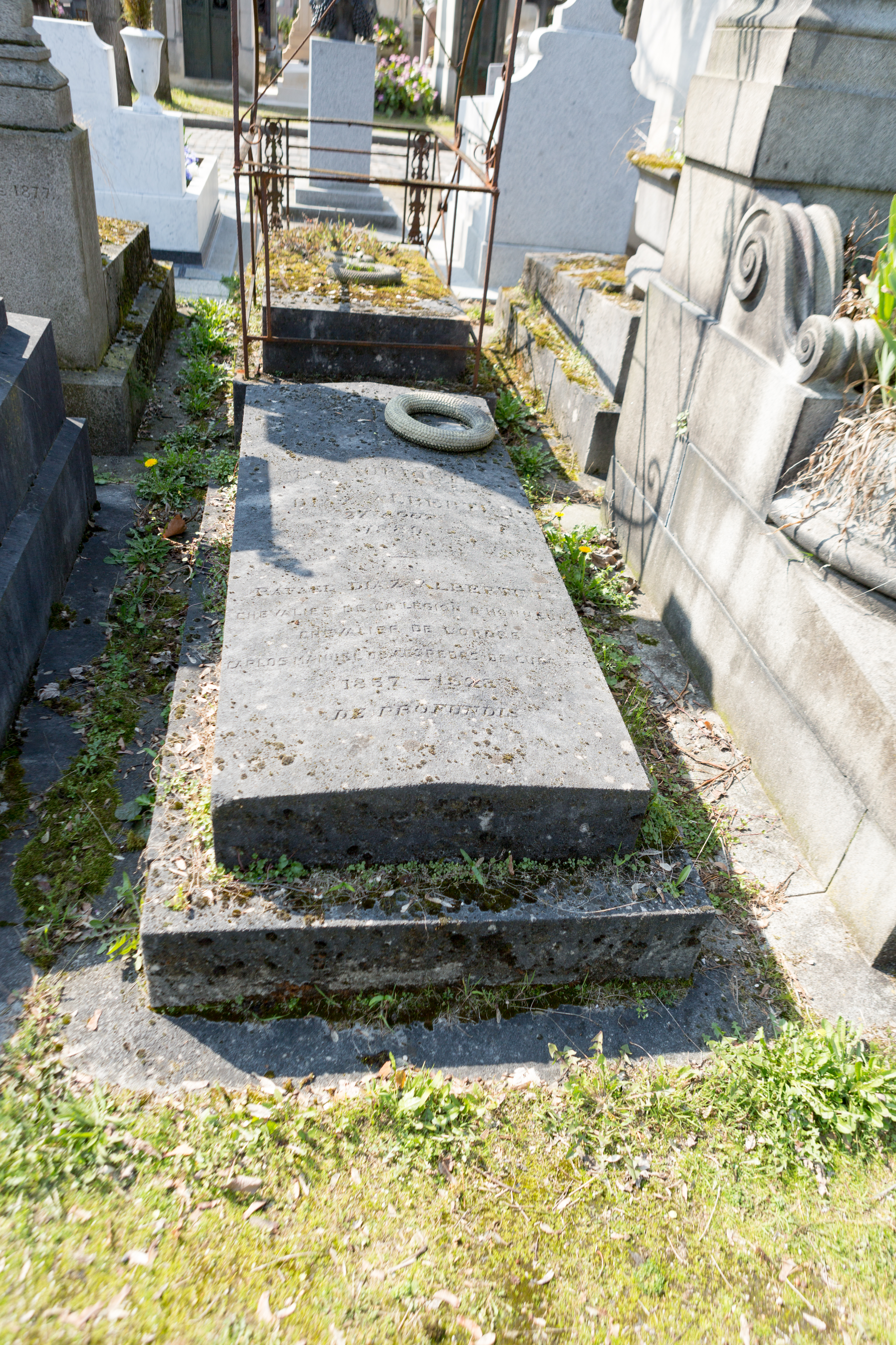 Sépulture de Rafael Díaz Albertini y Urioste (1857-1928), violoniste cubain.